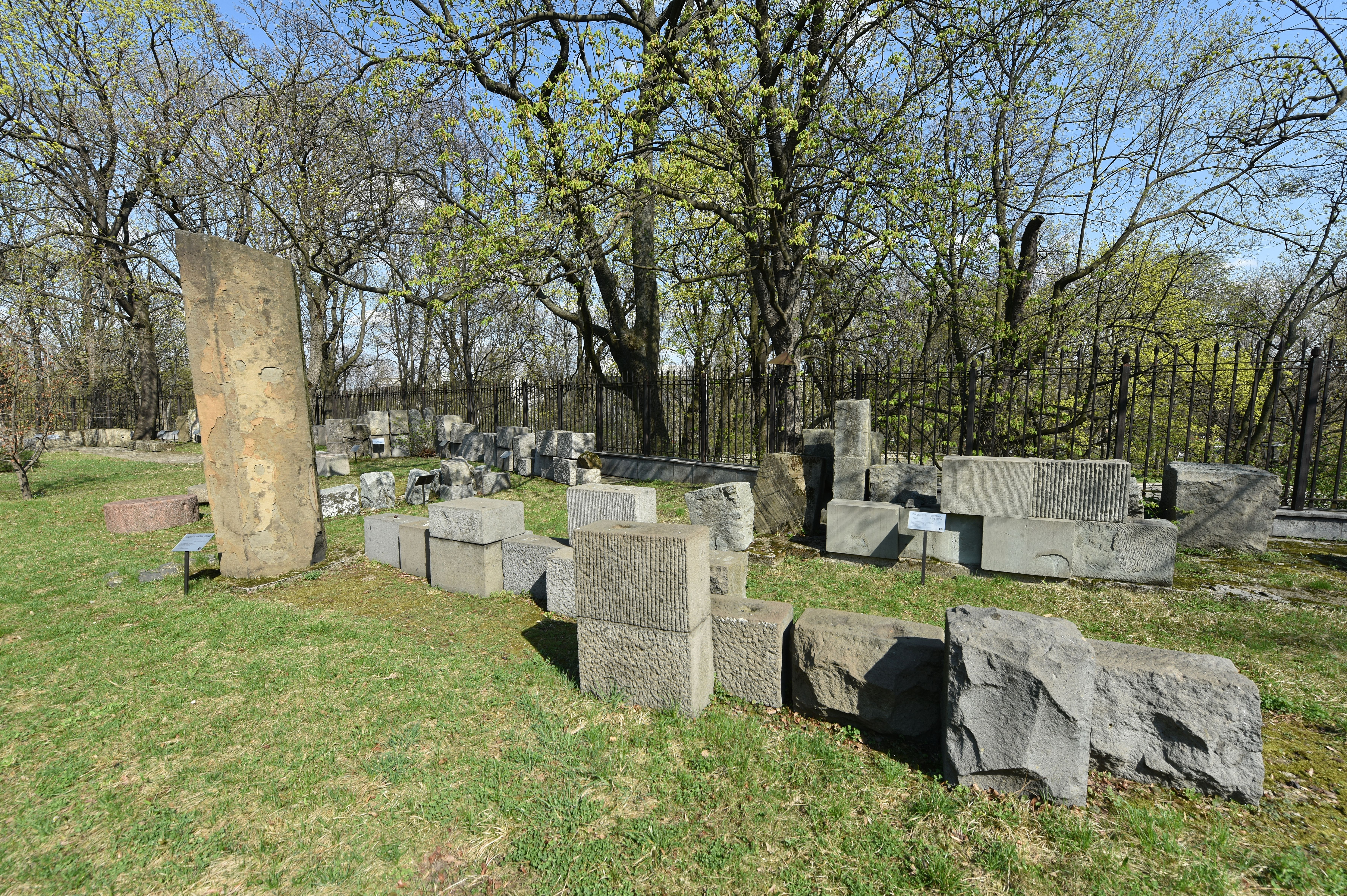 Zbiory skał eksponowane wokół Biały Pałacyku na Frascati, siedziby Muzeum Ziemi PAN w Warszawie